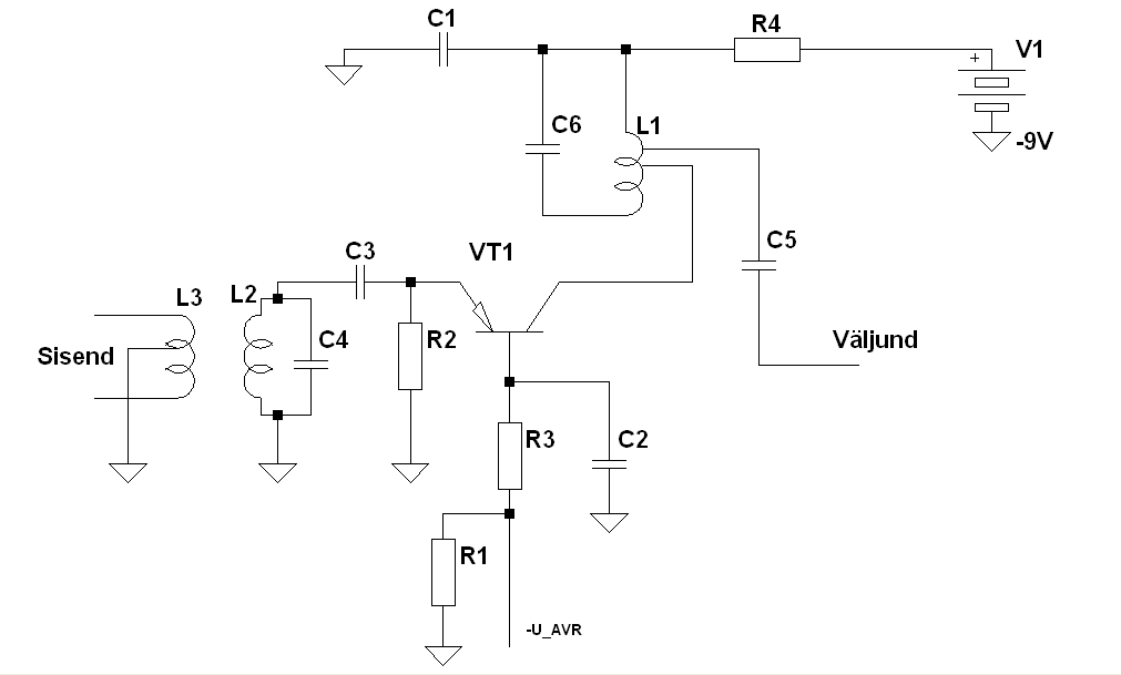 AVR šunteerimisega